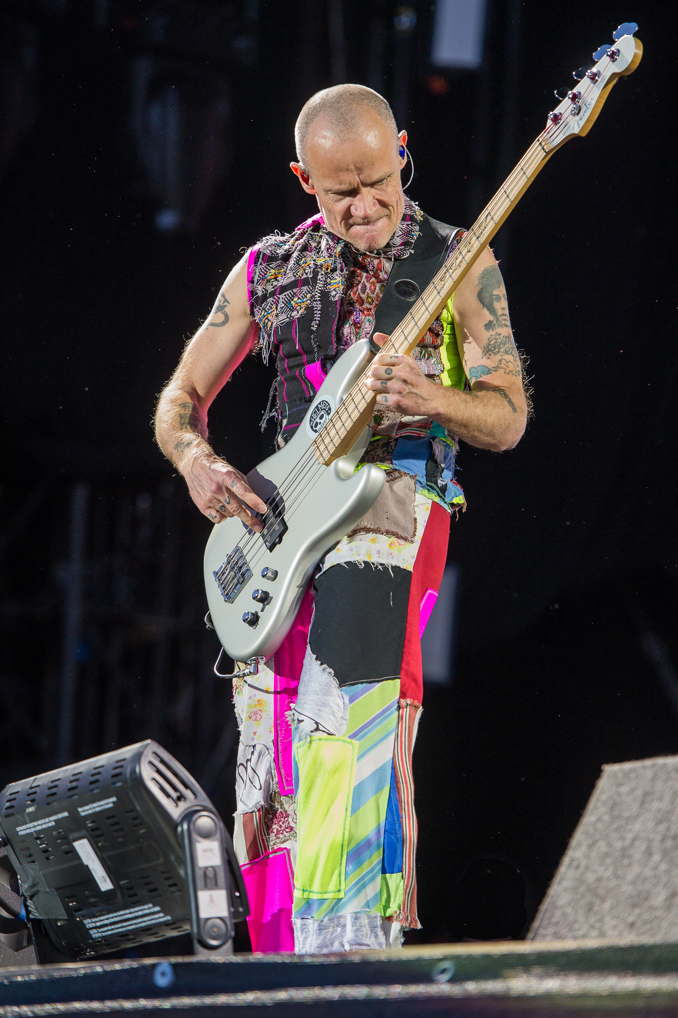 ARGO-Konzerte,Festival,Konzert,Livekonzert,Livemusik,Michael „Flea“ Balzary,Musik,Red Hot Chili Peppers,RiP,Rock im Park 2016,Seat Zeppelin Stage